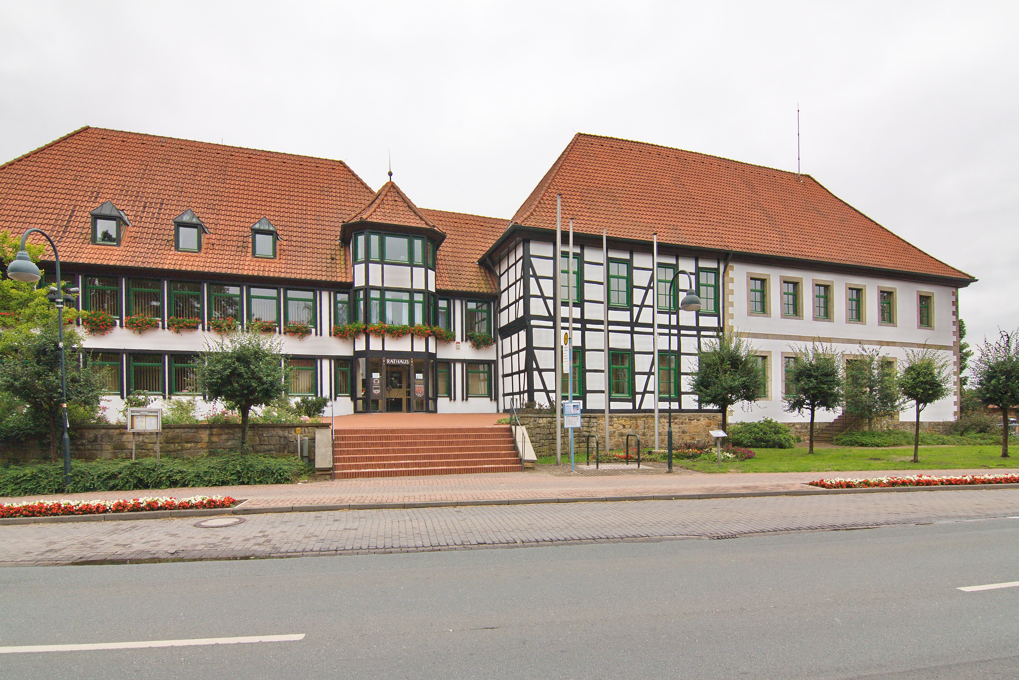 Rathaus in Rehburg (Rehburg-Loccum) in Niedersachsen